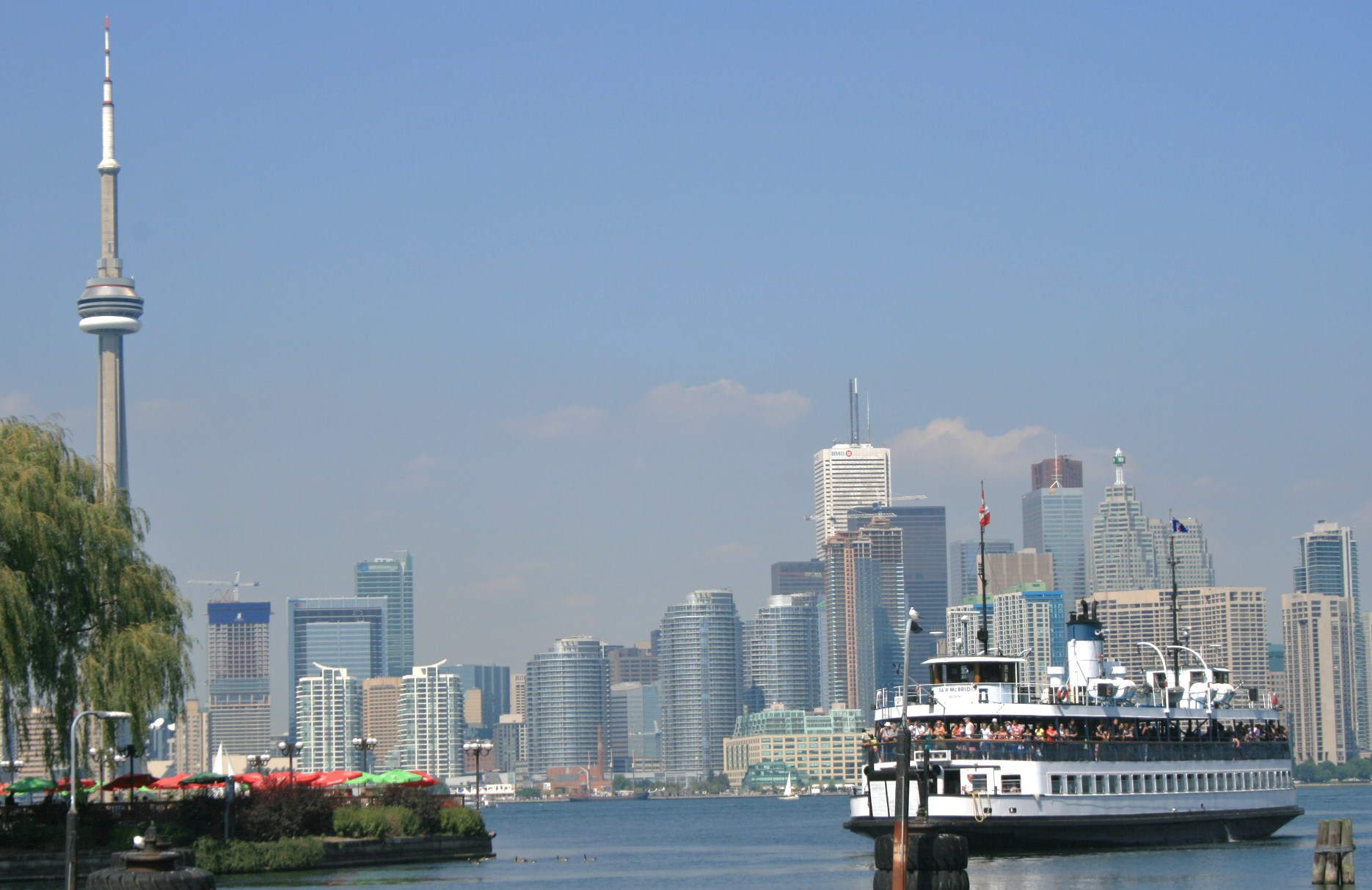 Toronto Ferry